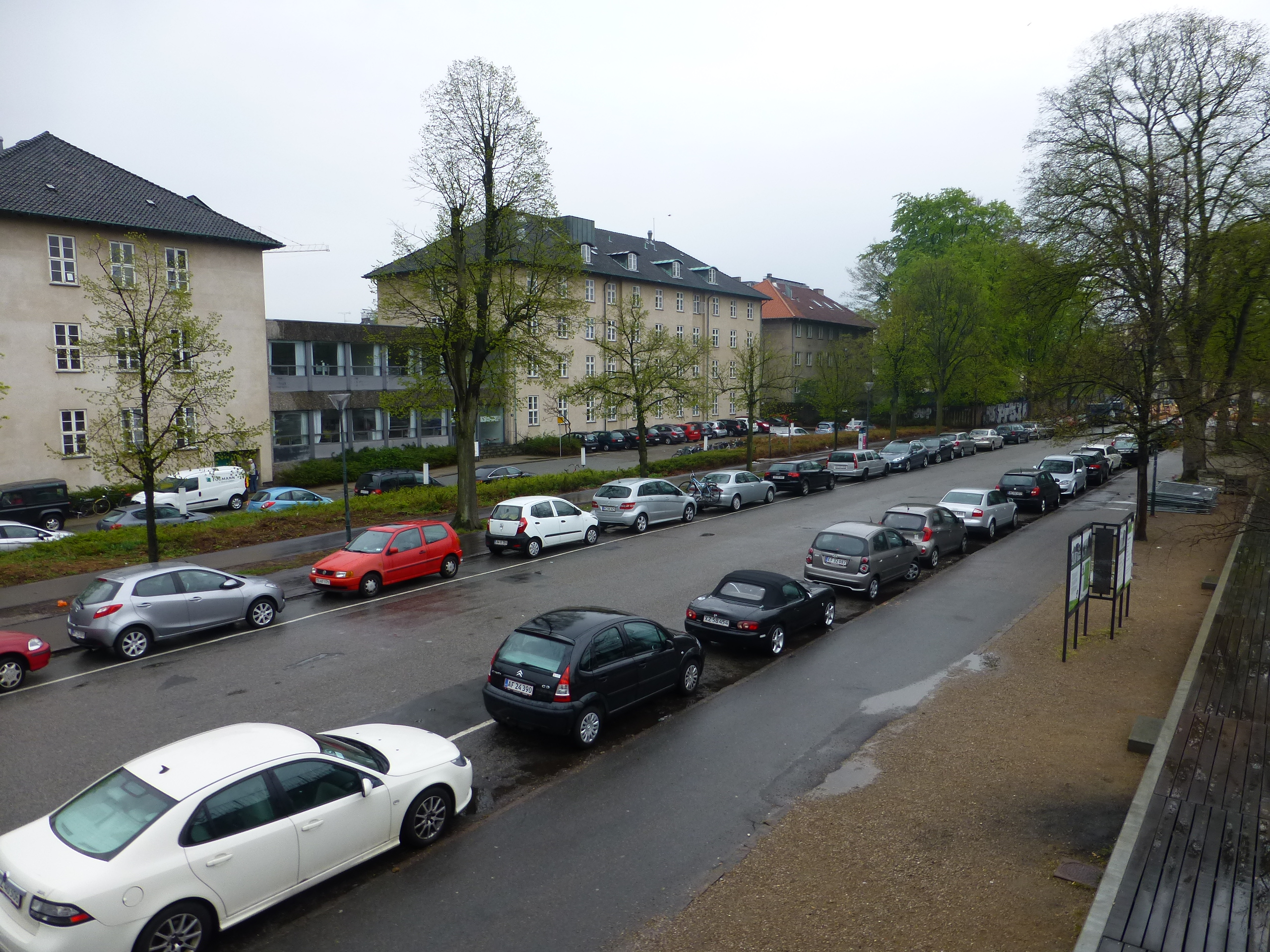 The street Edel Sauntes Alle in Østerbro in Copenhagen.